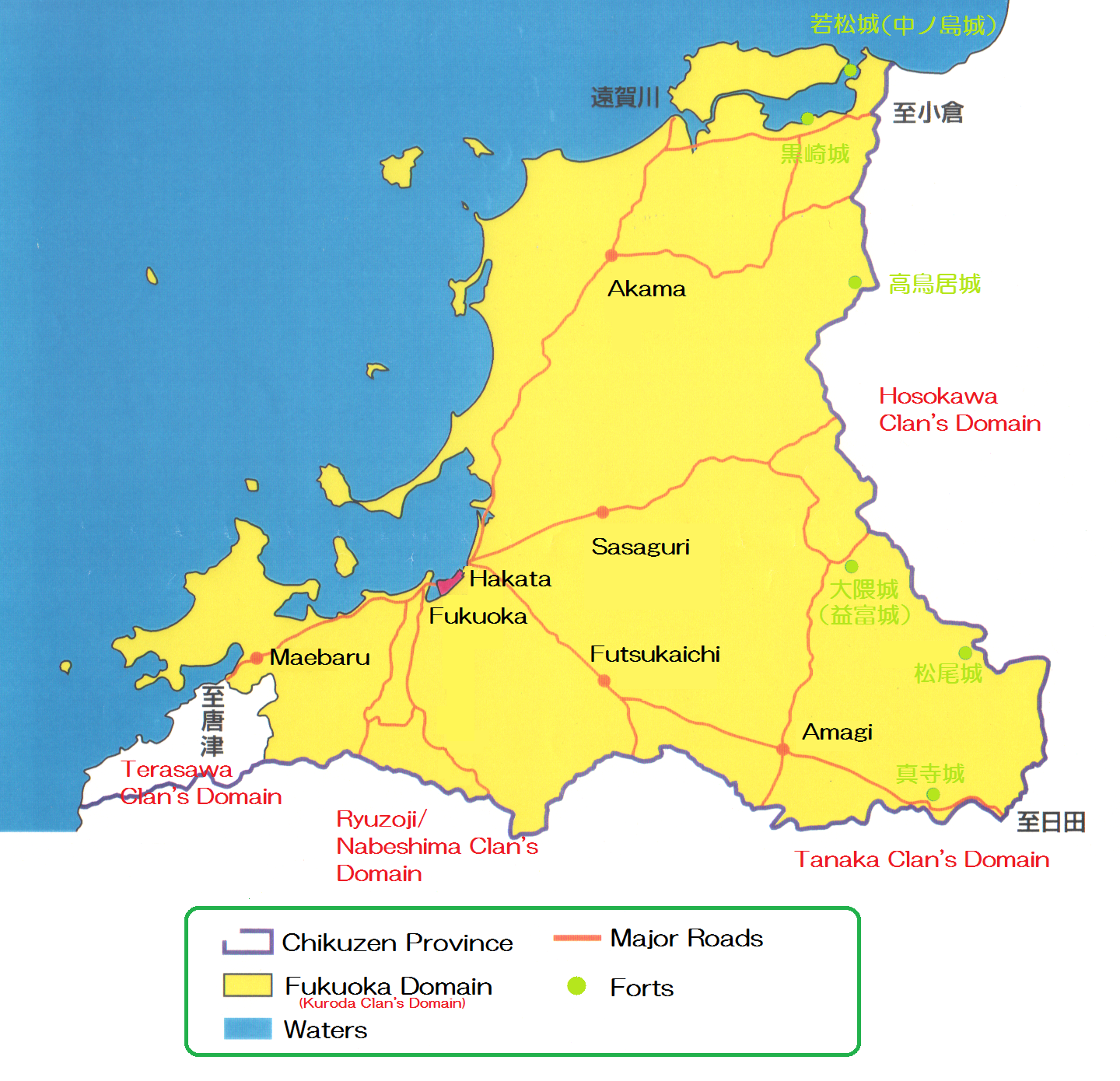 Fukuoka Domain (Early 17th century)